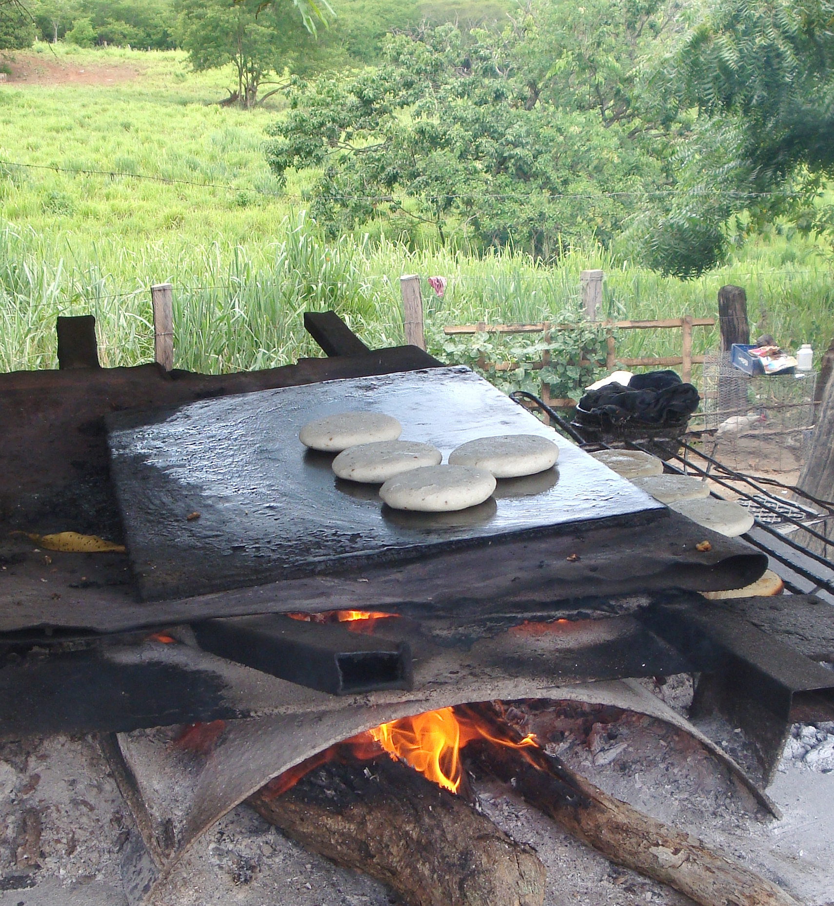 Arepas de maíz pelado, preparadas con leña en puestos de comida en la autopista que comunica los Estados Lara-Zulia en la República Bolivariana de Venezuela. La arepa es un plato típico de Venezuela, en la zona es muy común observar venta de arepas como contorno para otros platos.